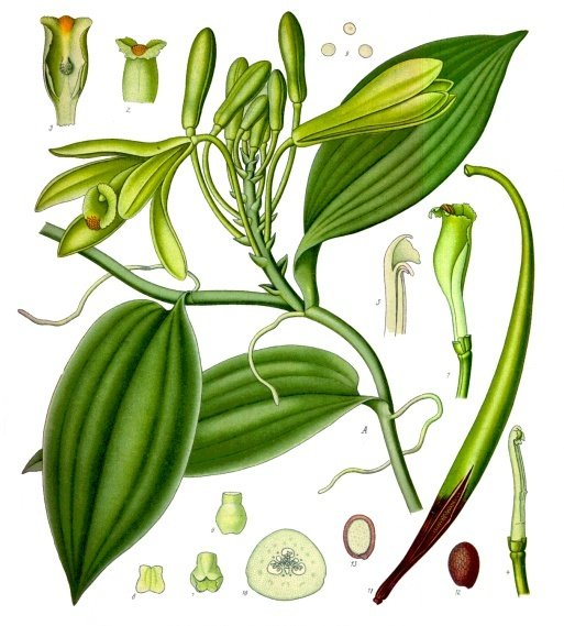 Echte Vanille. A Blühender Zweig, nat. Grösse; 1 Lippe vergrössert; 2 und 3 Oberer Theil der Lippe von der Rück- und Vorderseite, desgl.; 4 Griffelsäule, desgl.; 5 Oberer Theil derselben im Längsschnitt, desgl.; 6 fruchtbares Staubgefäss von aussen, noch nicht geöffnet, desgl.; 7 desselbe an der Spitze aufgesprungen, desgl.; 9 Pollen, desgl.; 10 Fruchtknoten im Querschnitt, desgl.; 11 Frucht, nat. Grösse; 12 Same, vergrössert; 13 derselbe zerschnitten, desgl.